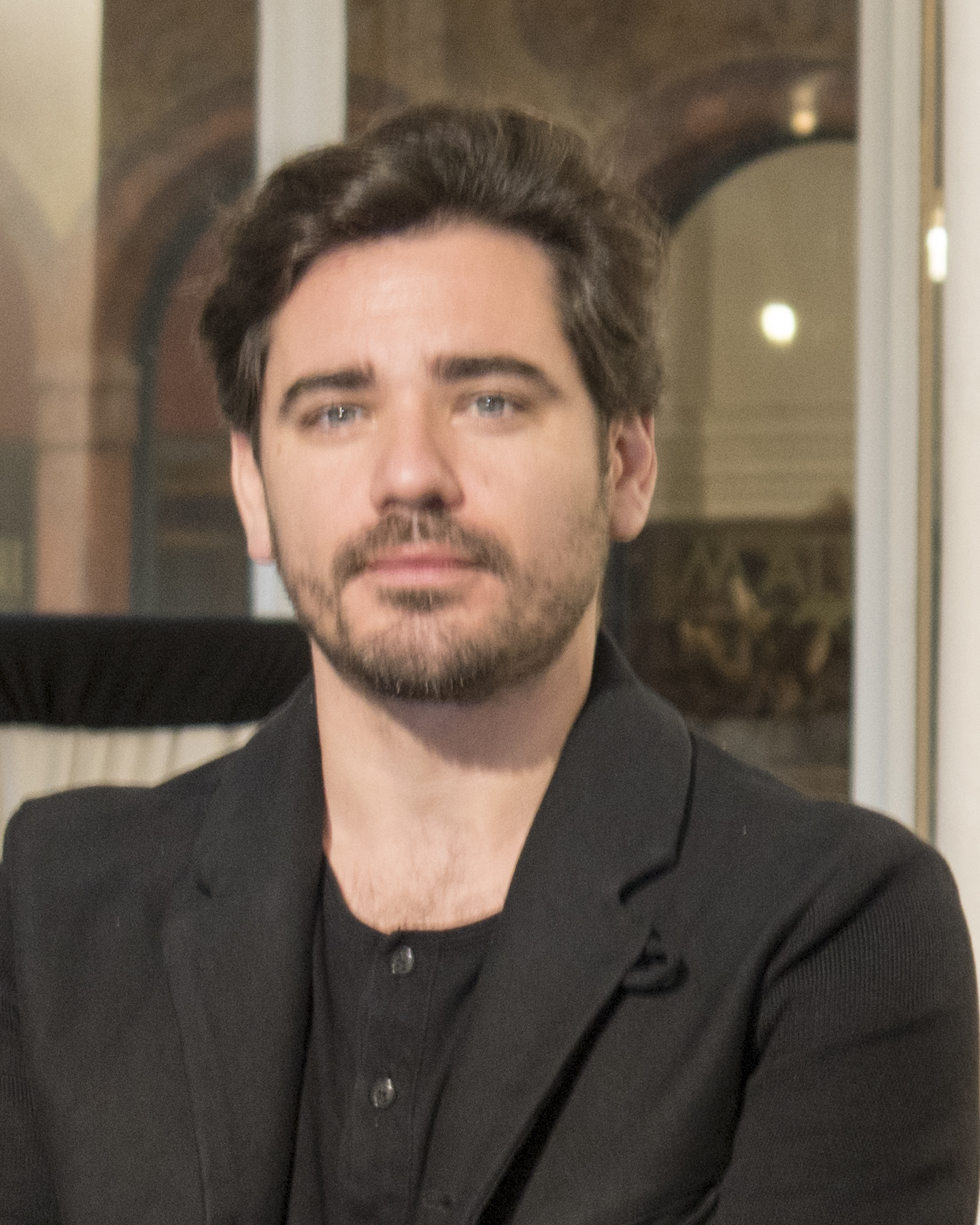 Novinářská konference 9.12.2019. Autor: Blanka Borová (Karolína Černá) pro Kritiky.cz